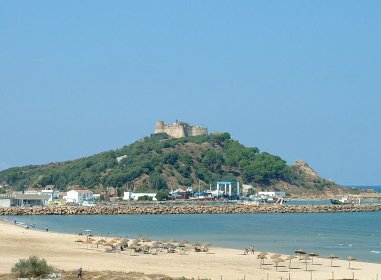 Photographie personnelle prise à Tabarka (Tunisie). Surplombant le port de plaisance et la plage, qui démarre la zone touristique, le fort génois contient des ajouts nécessaires à la production d'un film italien au moment de la prise de vue.